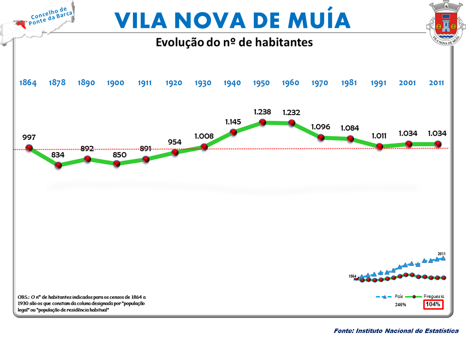 Censos 1864/2011